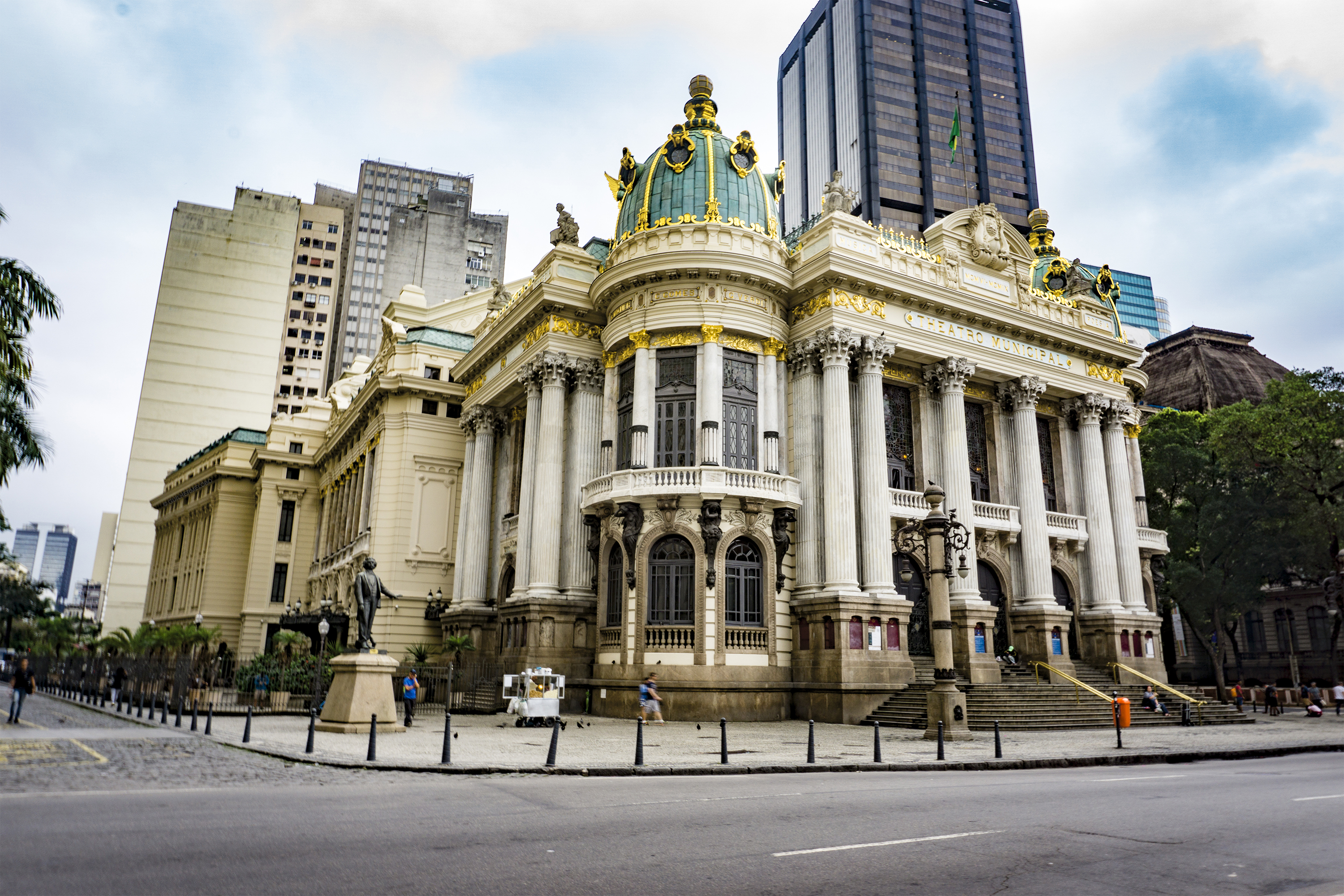 Teatro Municipal: prédio